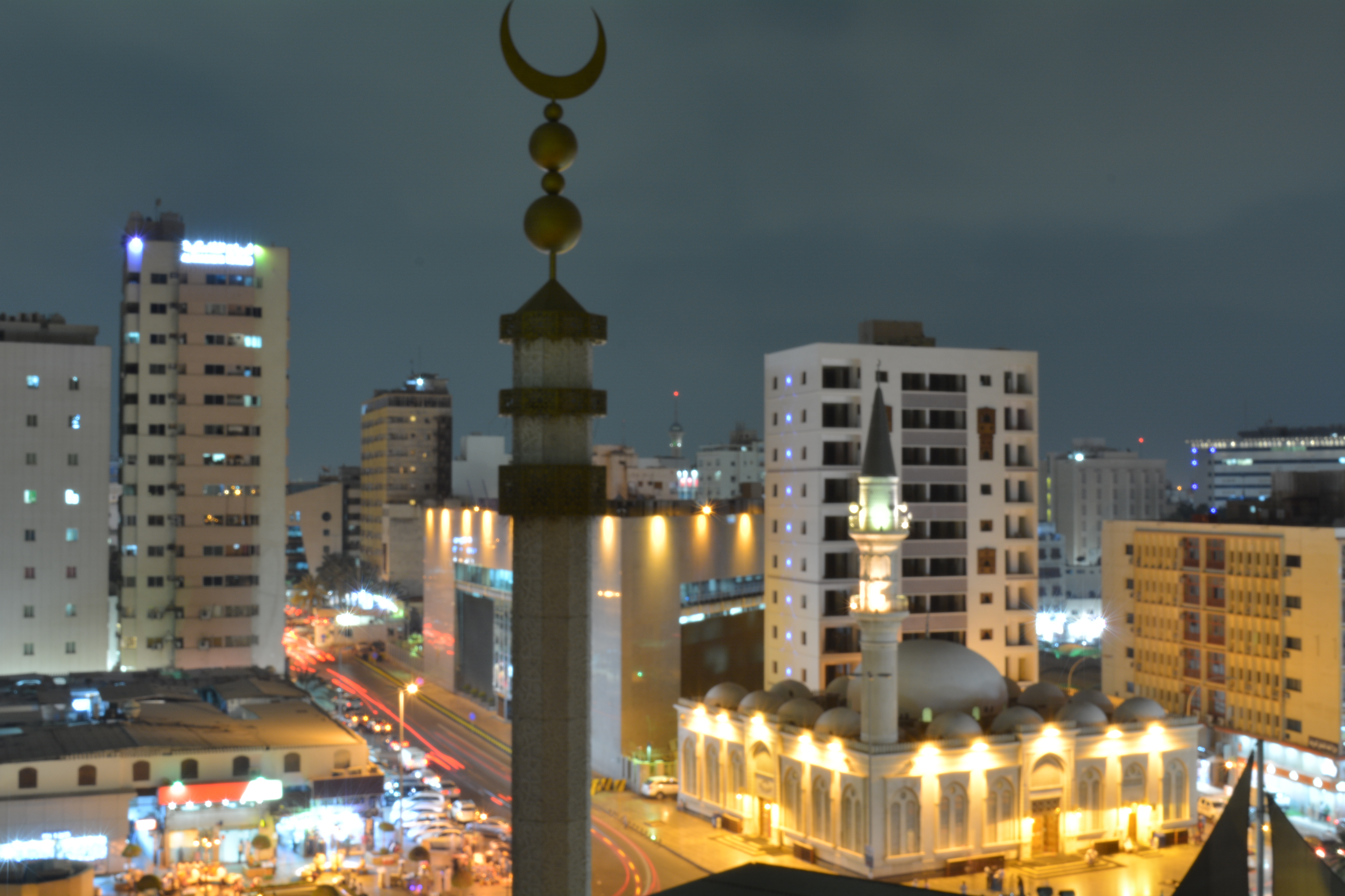 منطقة البلد في مدينة جدة بغرب المملكه العربيه السعوديه من تصويري